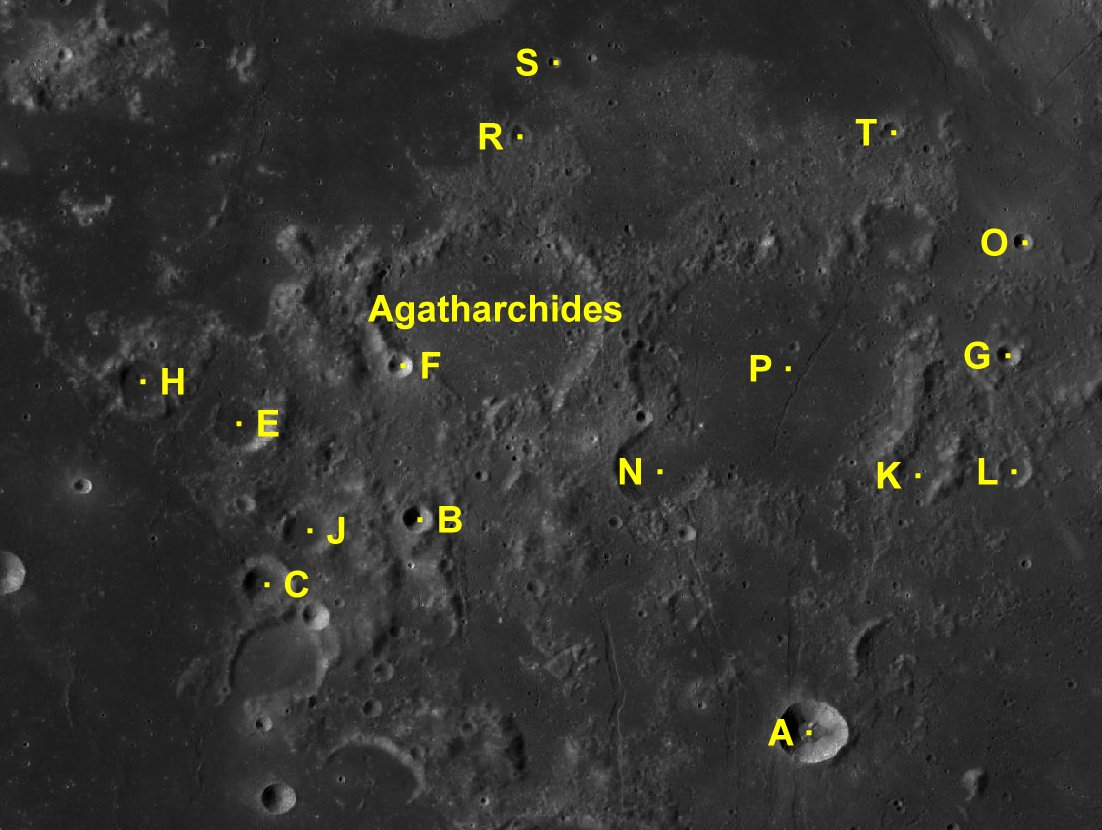 Cráter lunar Agatharchides. Cráteres satélite. (Imagen LRO)